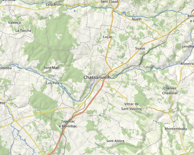 Mapa occitana de las comunas. Font: OpenStreetMap.